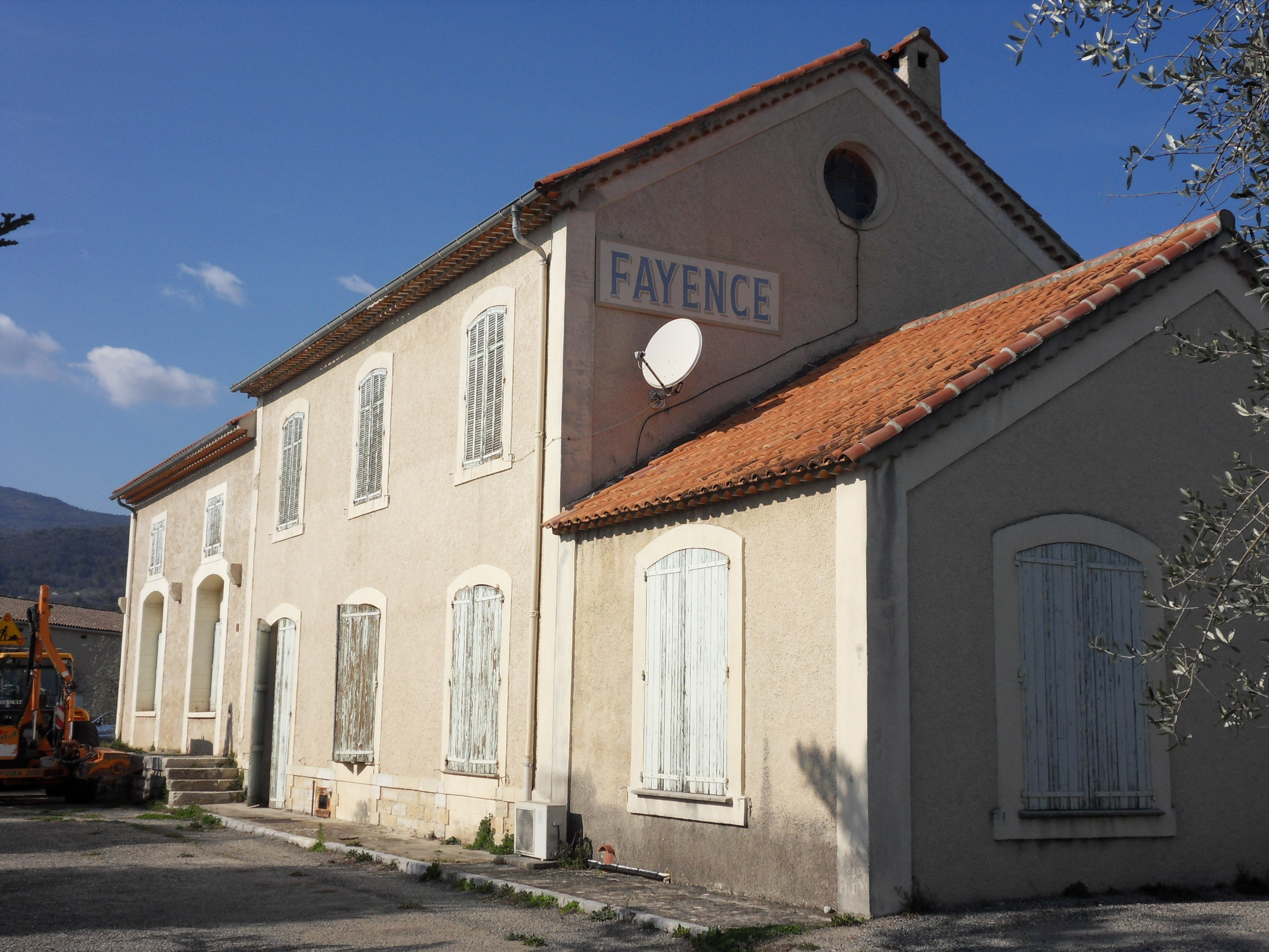 Fayence. Ancienne gare de la ligne ferroviaire du Central-Var